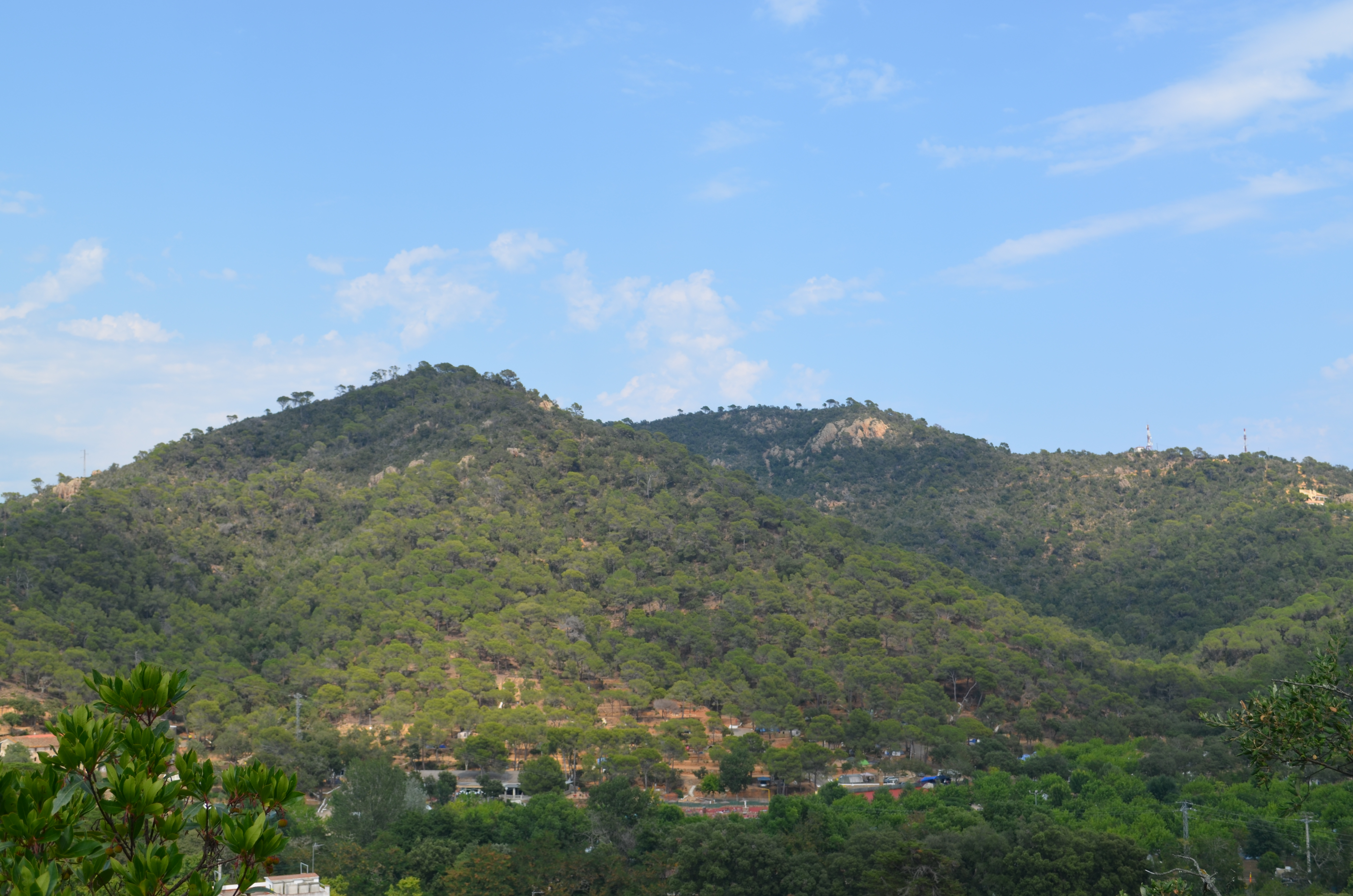 Tossa de Mar, Puig Nau